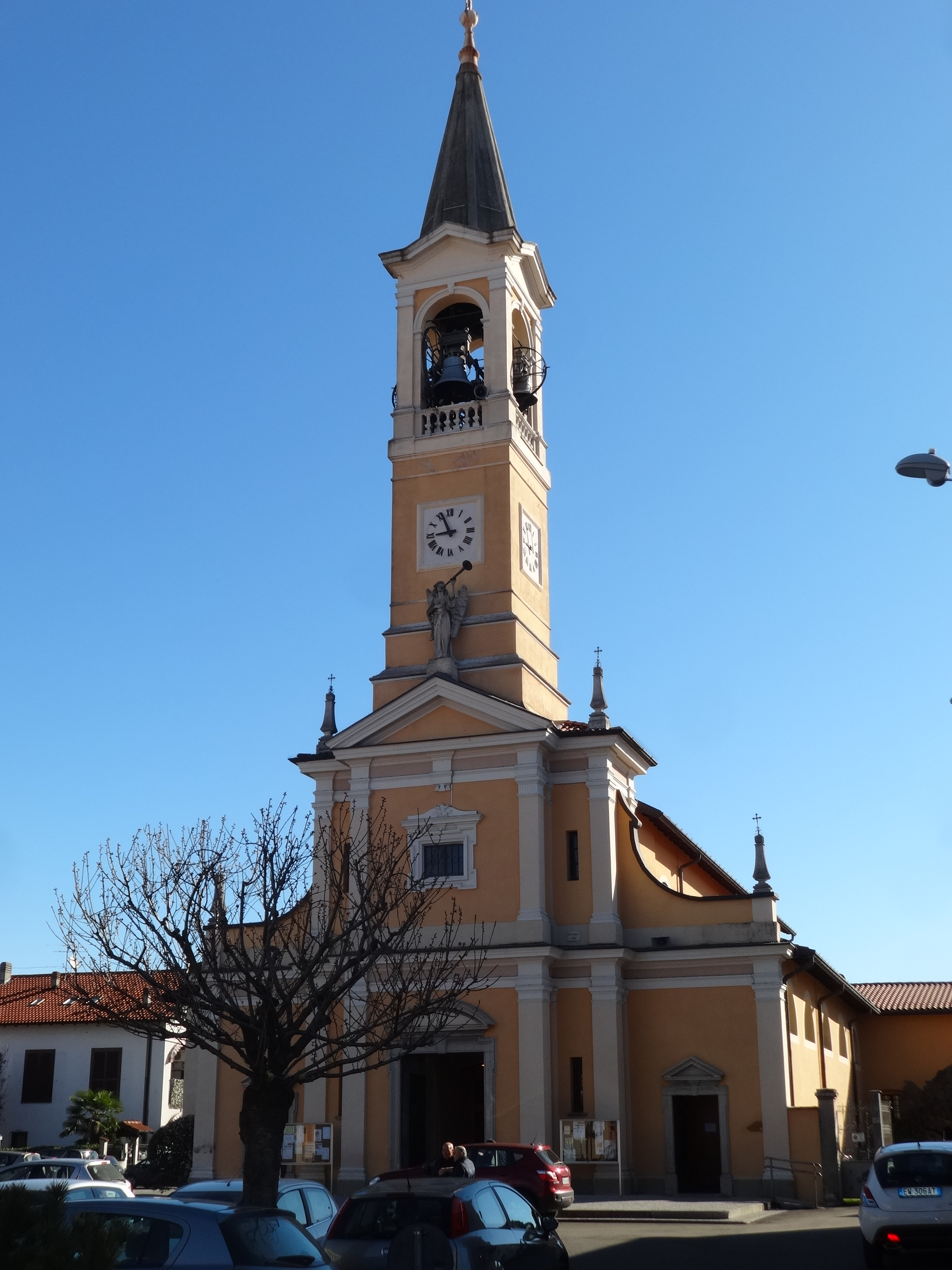 Chiesa S. Ilario Marnate